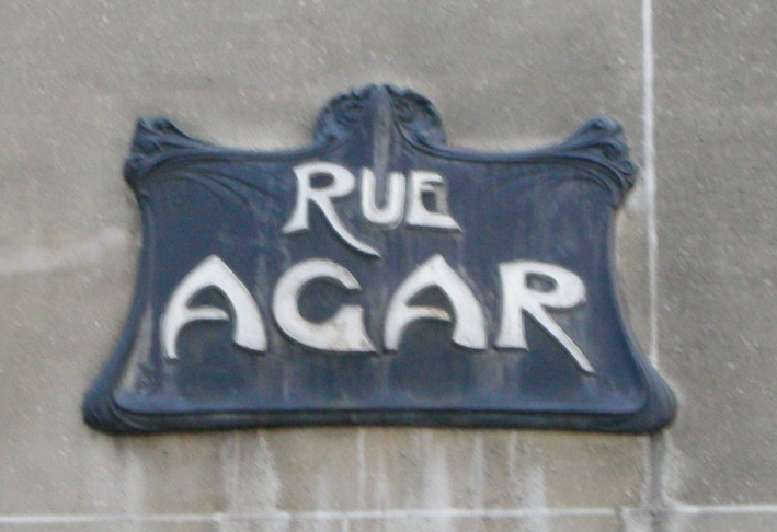 Rue la fontaine 19-21